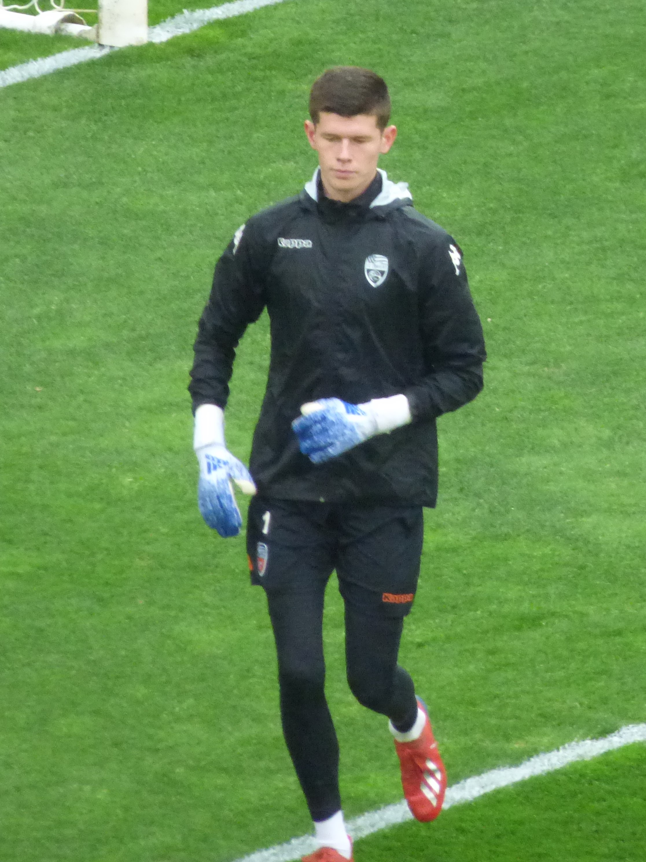 Illan Meslier avant le match RC Lens / FC Lorient, comptant pour la 34ème journée du championnat de France de Ligue 2 de football 2018-2019, le 23 avril 2019, au Stade Bollaert-Delelis.